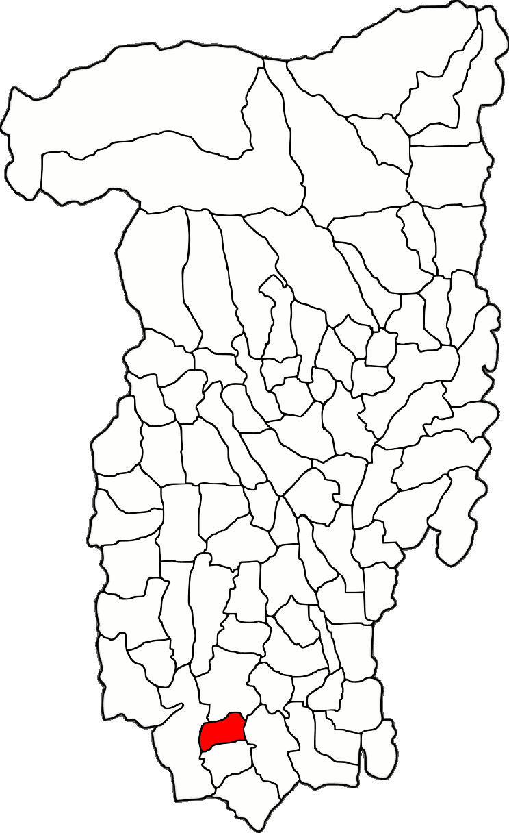 Lage der Gemeinde Diculești im Kreis Vâlcea (RO).